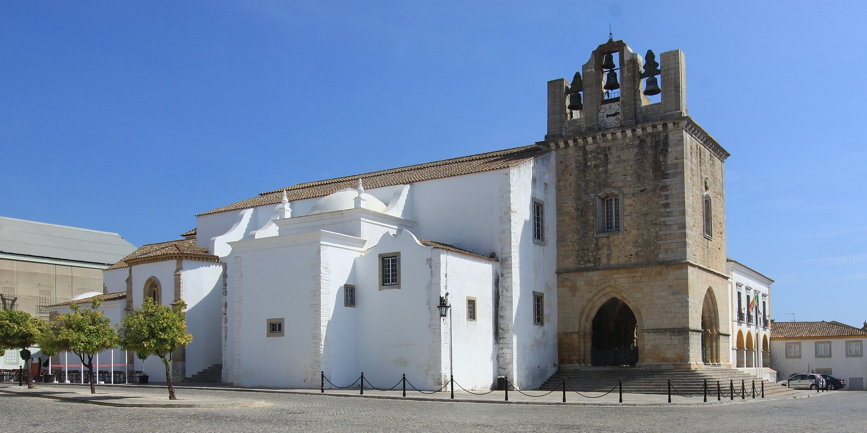 Kathedrale, Faro, Algarve, Portugal